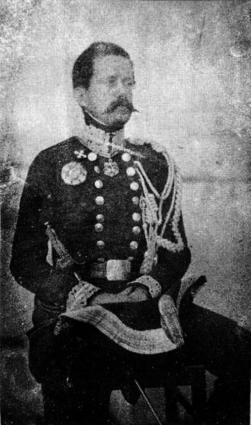 Ferdinand Maria von Savoyen-Carignan (1822−1833)